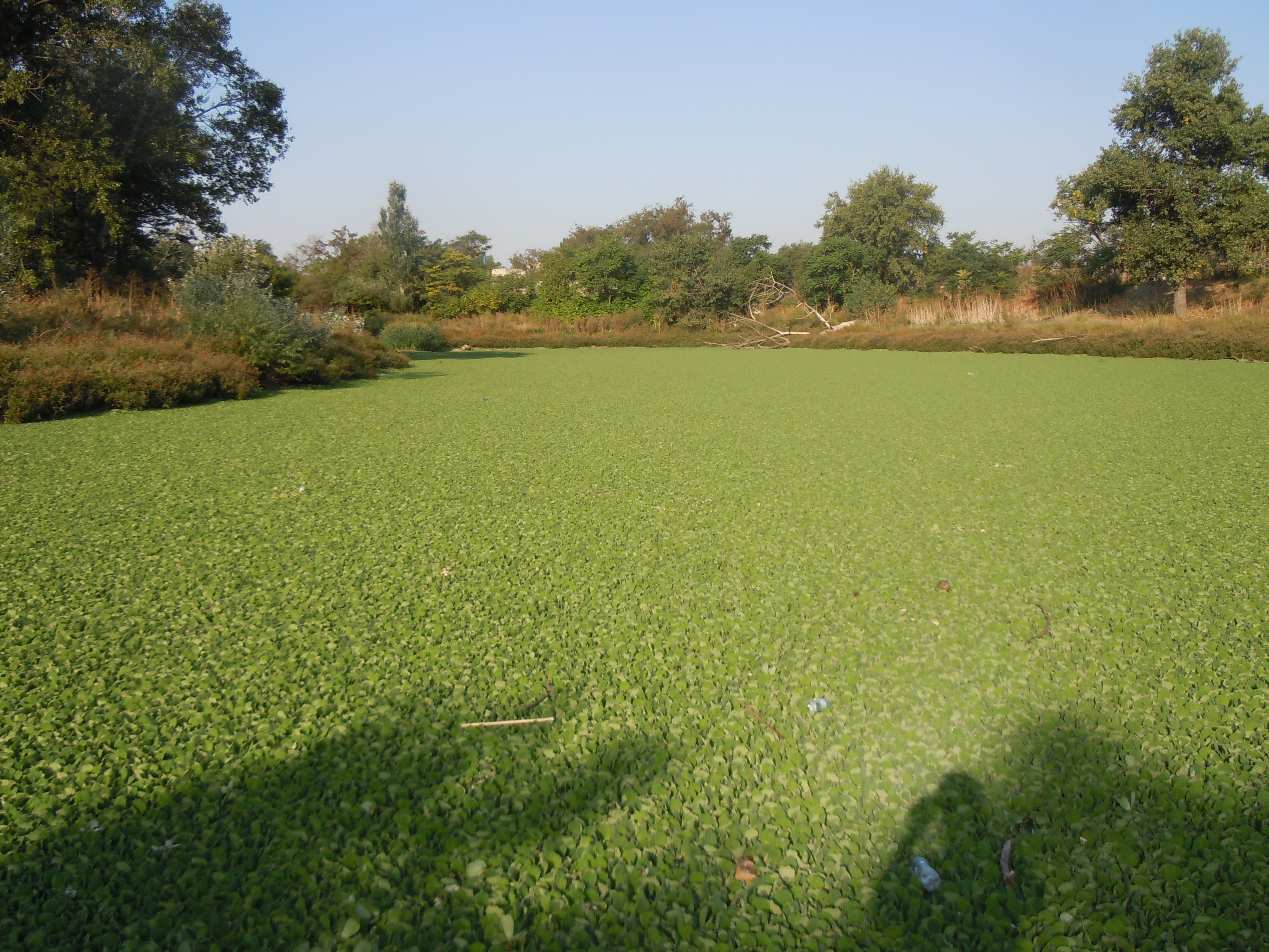 Ставок, вкритий водяним салатом (Pistia stratiotes), Одеса